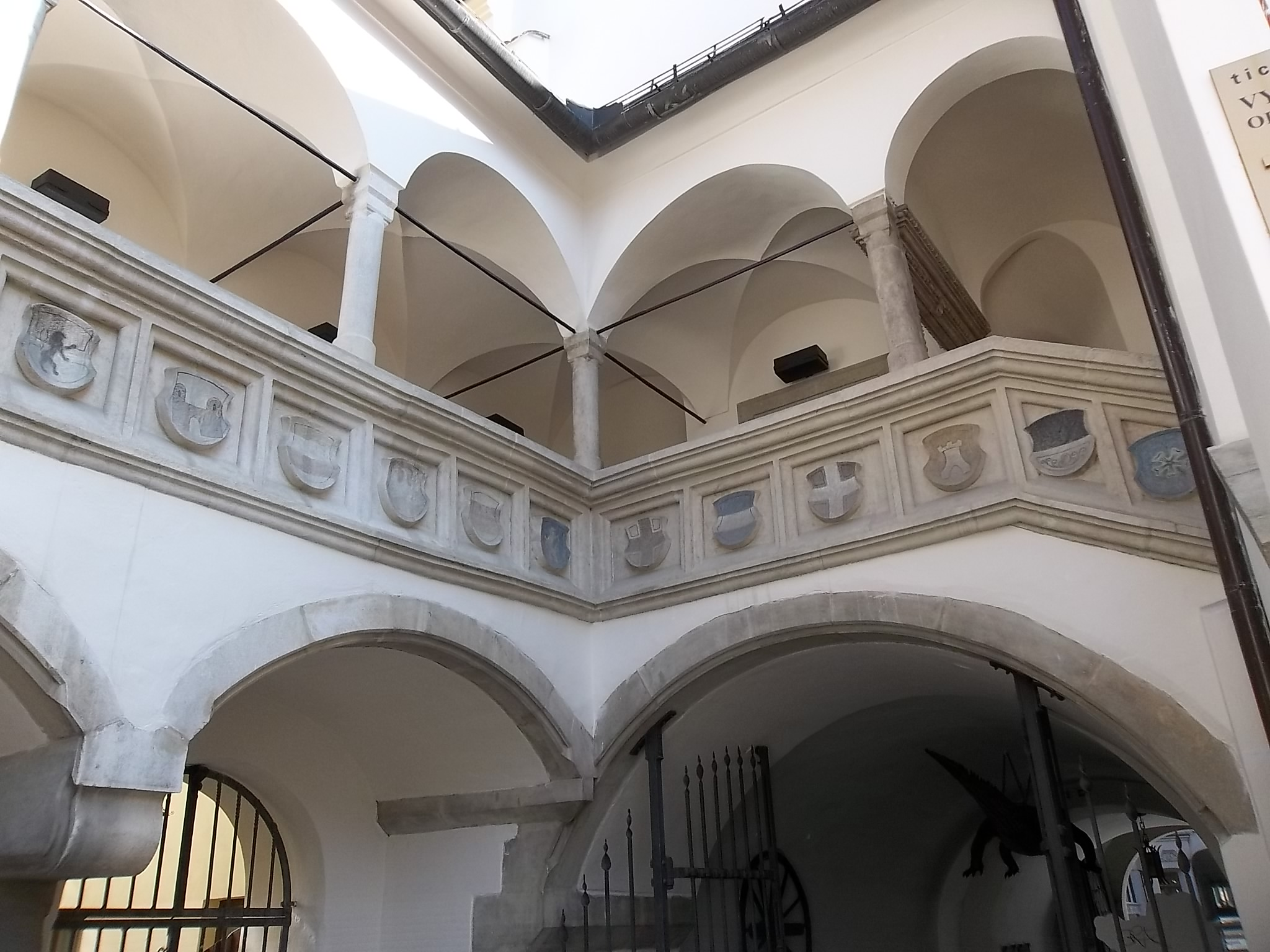 Brno,Česká republika